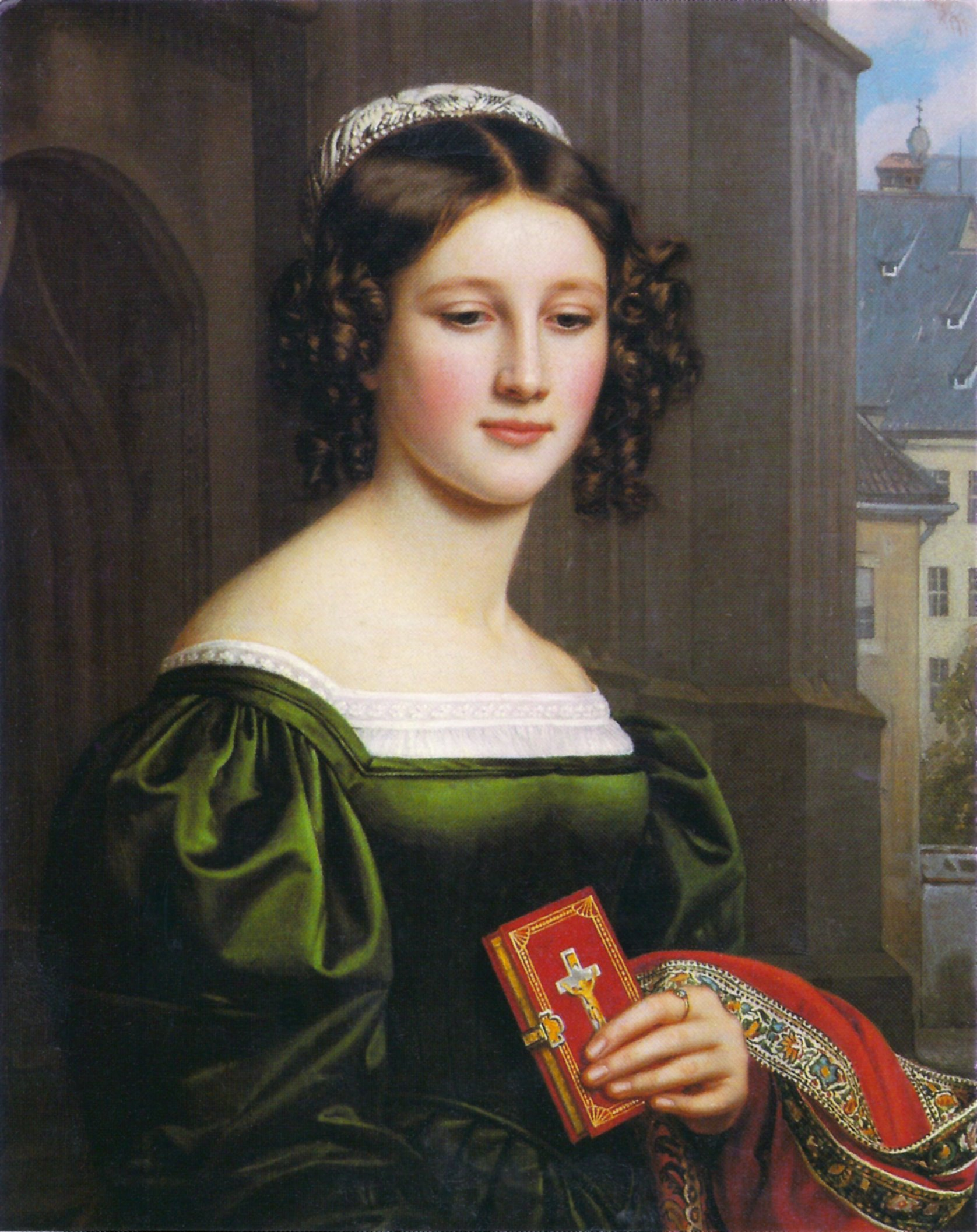 Tochter des Wildprethändlers Hillmayer im Rosental 2, München, gemalt 1829 für die Schönheitengalerie